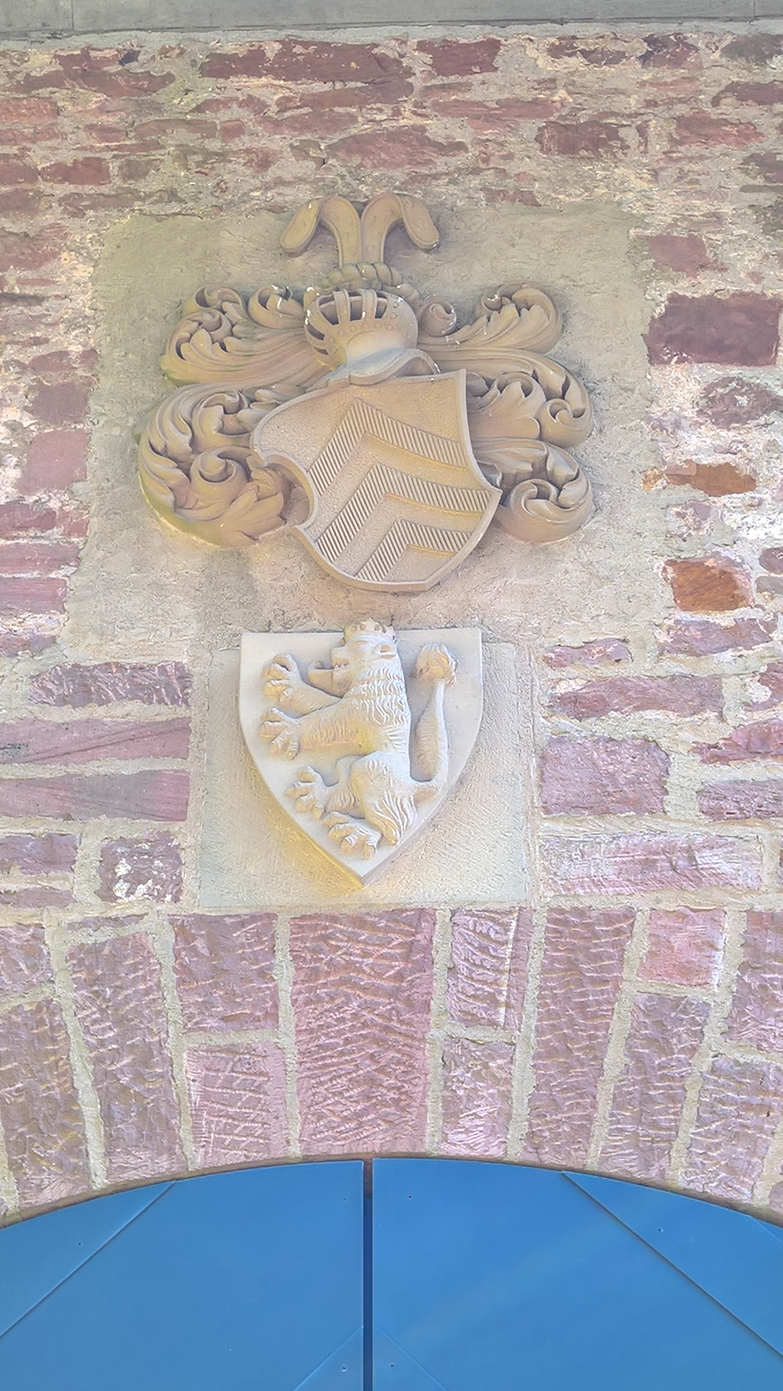 Wappen über der Toreinfahrt zur Mittelburg in Neckarsteinach. Oberes Wappen: Freiherren von Dorth; unteres Wappen: reduziertes Wappen der von Warsberg (Varsberg, Warszberg)